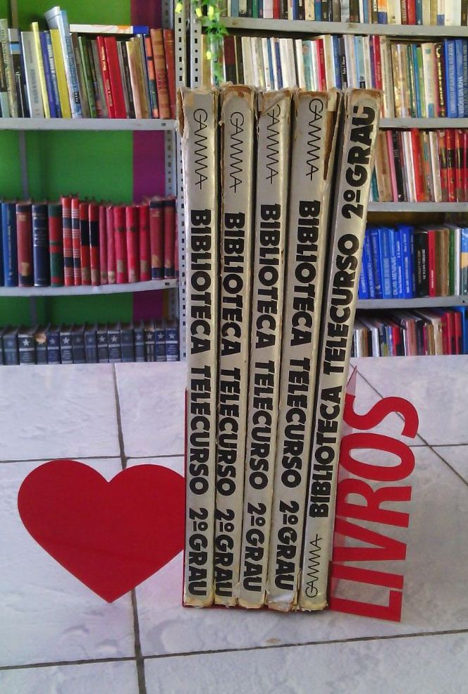 Acervos do Telecurso da Fundação Roberto Marinho e Fundação Padre José de Anchieta.